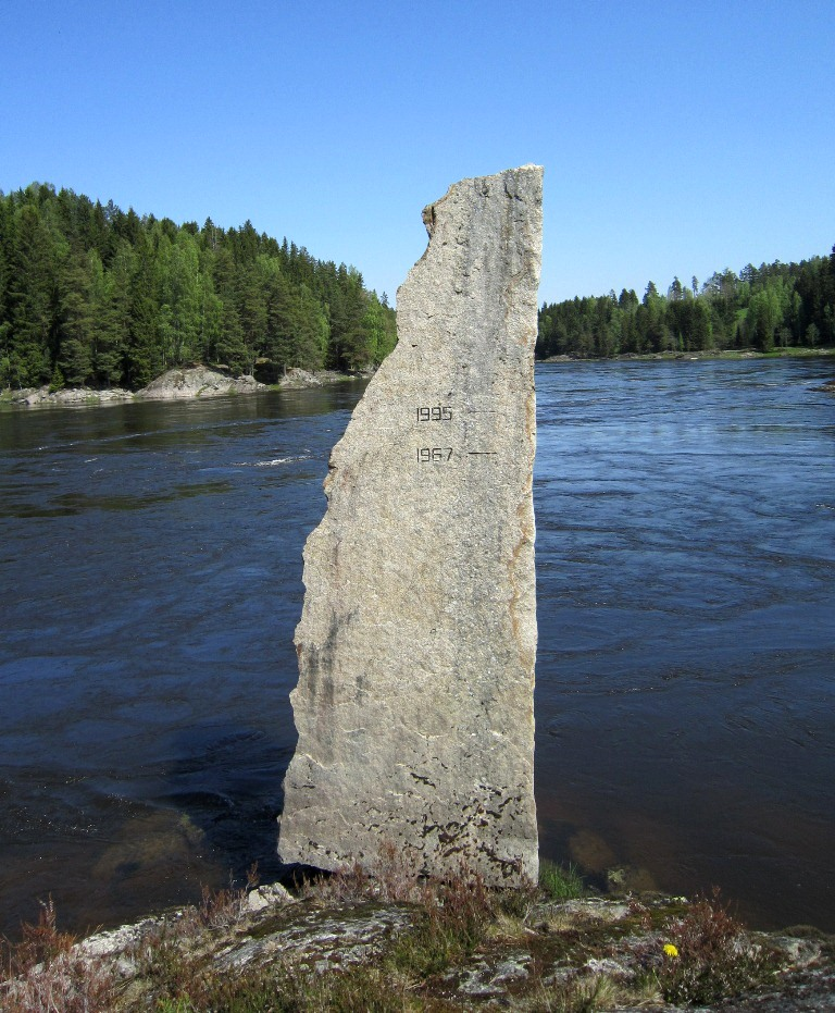 Flomstein langs Glomma ved Fossum bru i Askim